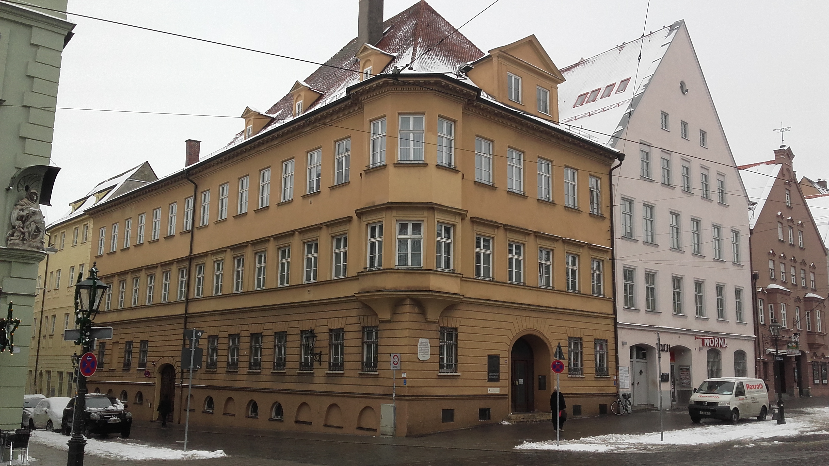 Blick auf das Anwesen Maximilianstraße 69 in Augsburg